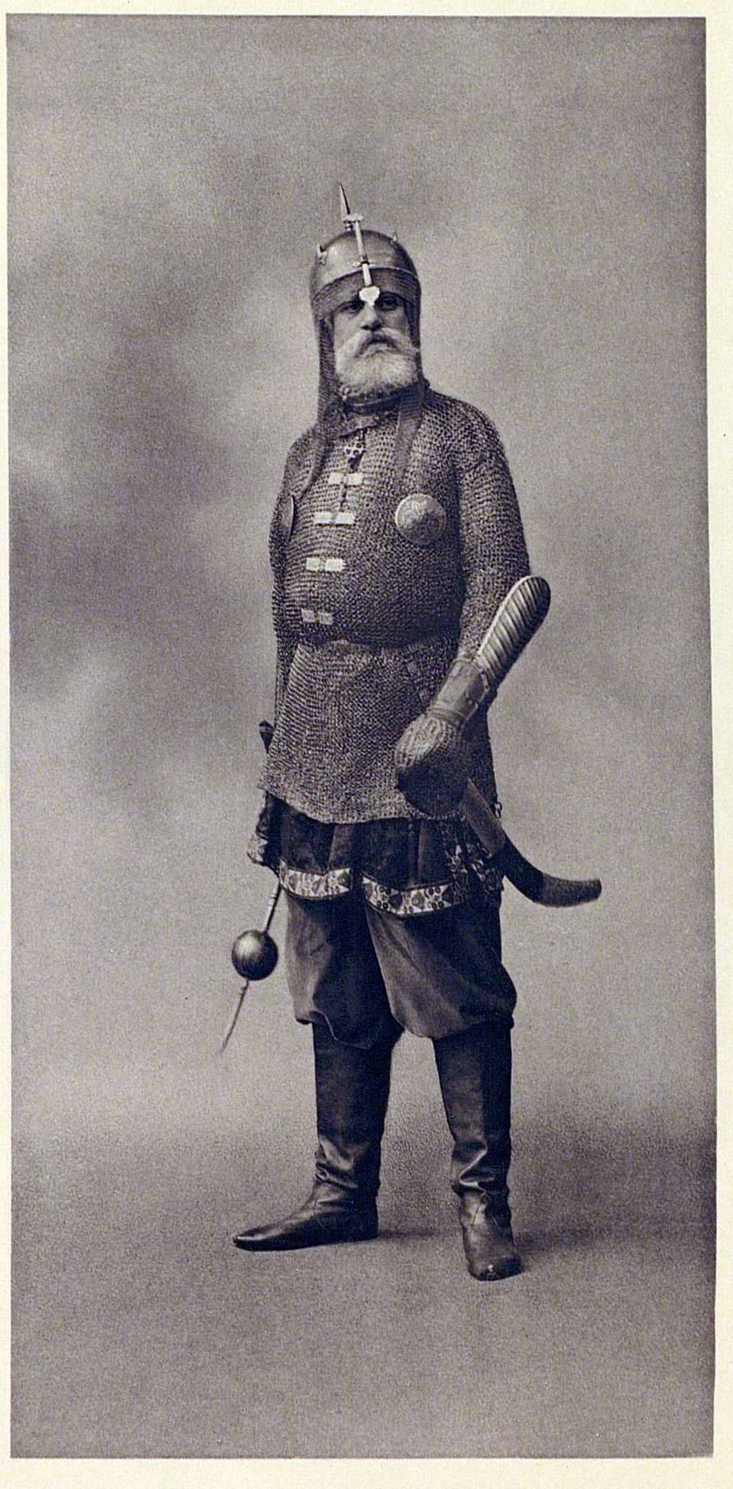 Барон Феофил Егорович Мейендорф в костюме воеводы Большого полка войск князя Пожарского